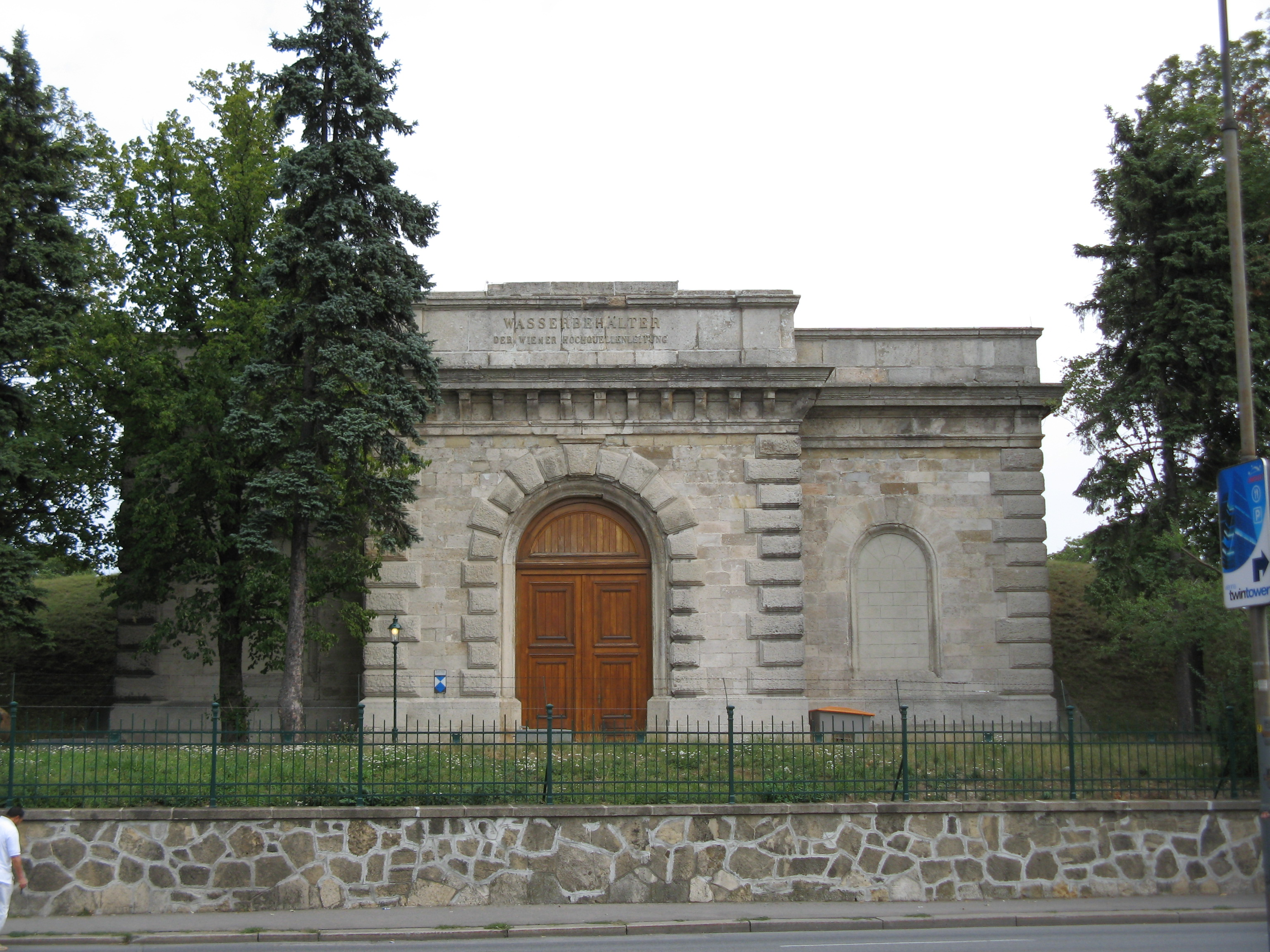 Einlaufbauwerk des Hebewerks Favoriten an der Triester Straße, Wien-Favoriten